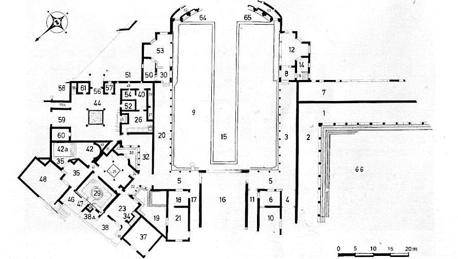 Mappa di Villa San Marco